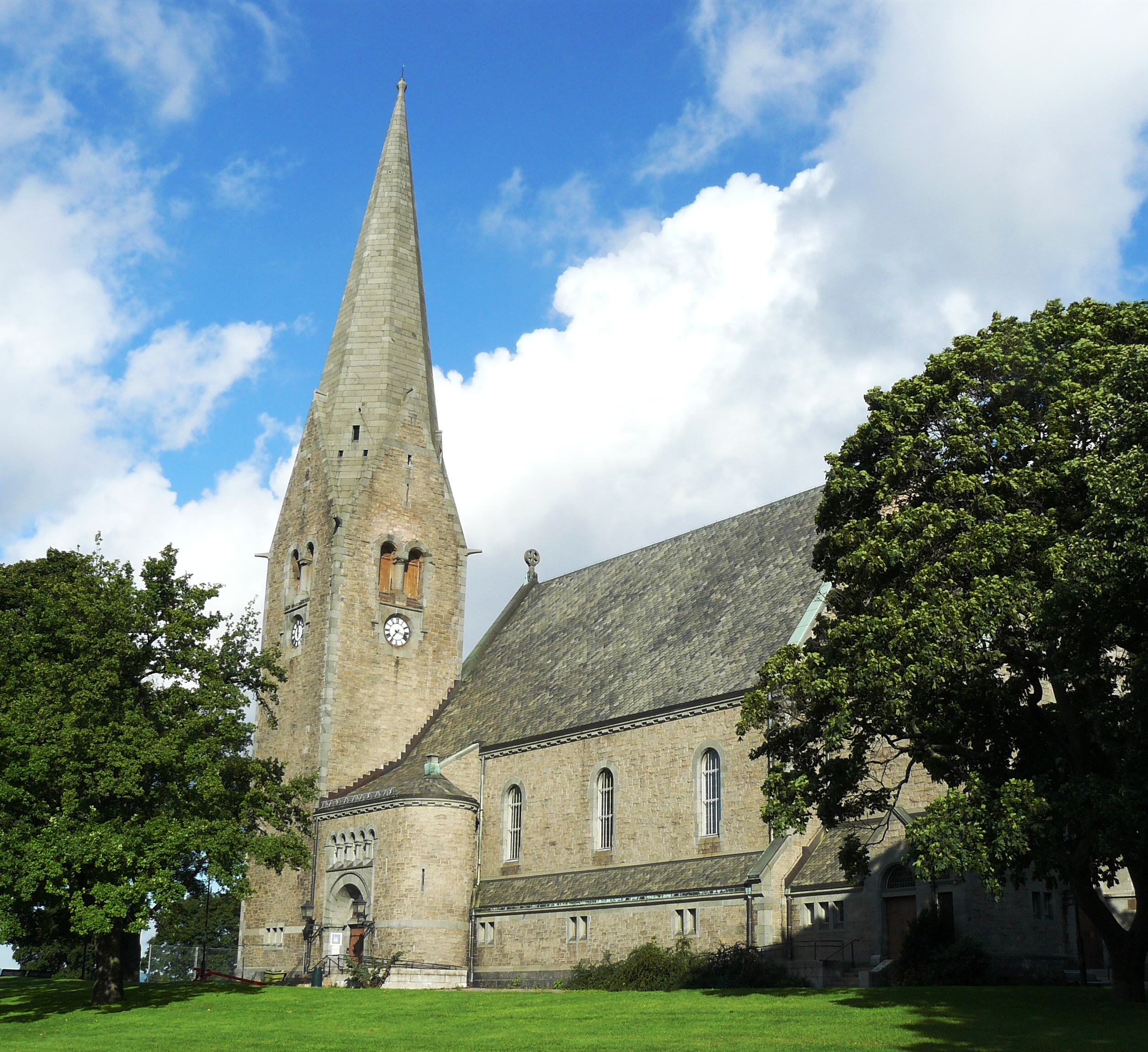 Vålerenga church, Oslo